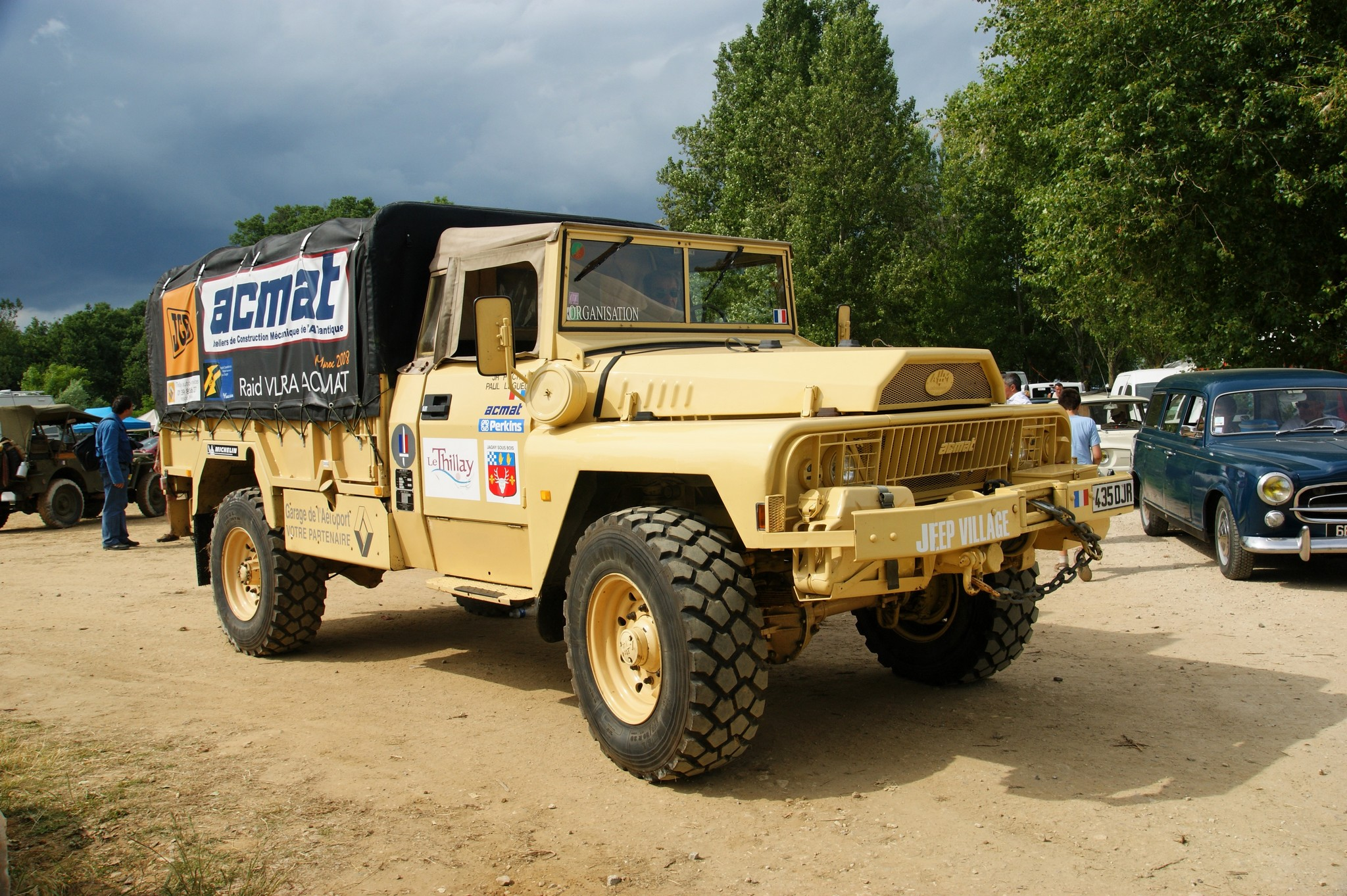 Camion militaire ACMAT VLRA (Véhicule Léger de Reconnaissance et d'Appui) produit par la société française ACMAT ( les Ateliers de Constructions Mécanique de l'Atlantique) implantée au Point-Du-Jour à Saint Nazaire. Vu lors de La Locomotion en fête à La Ferté Alais (2009).